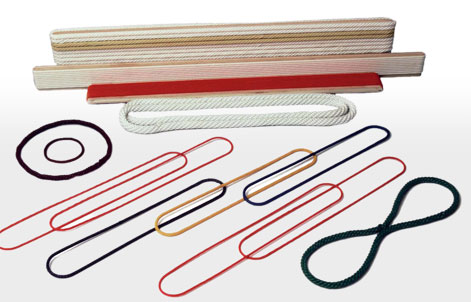 Endlos gederhte rundriemen